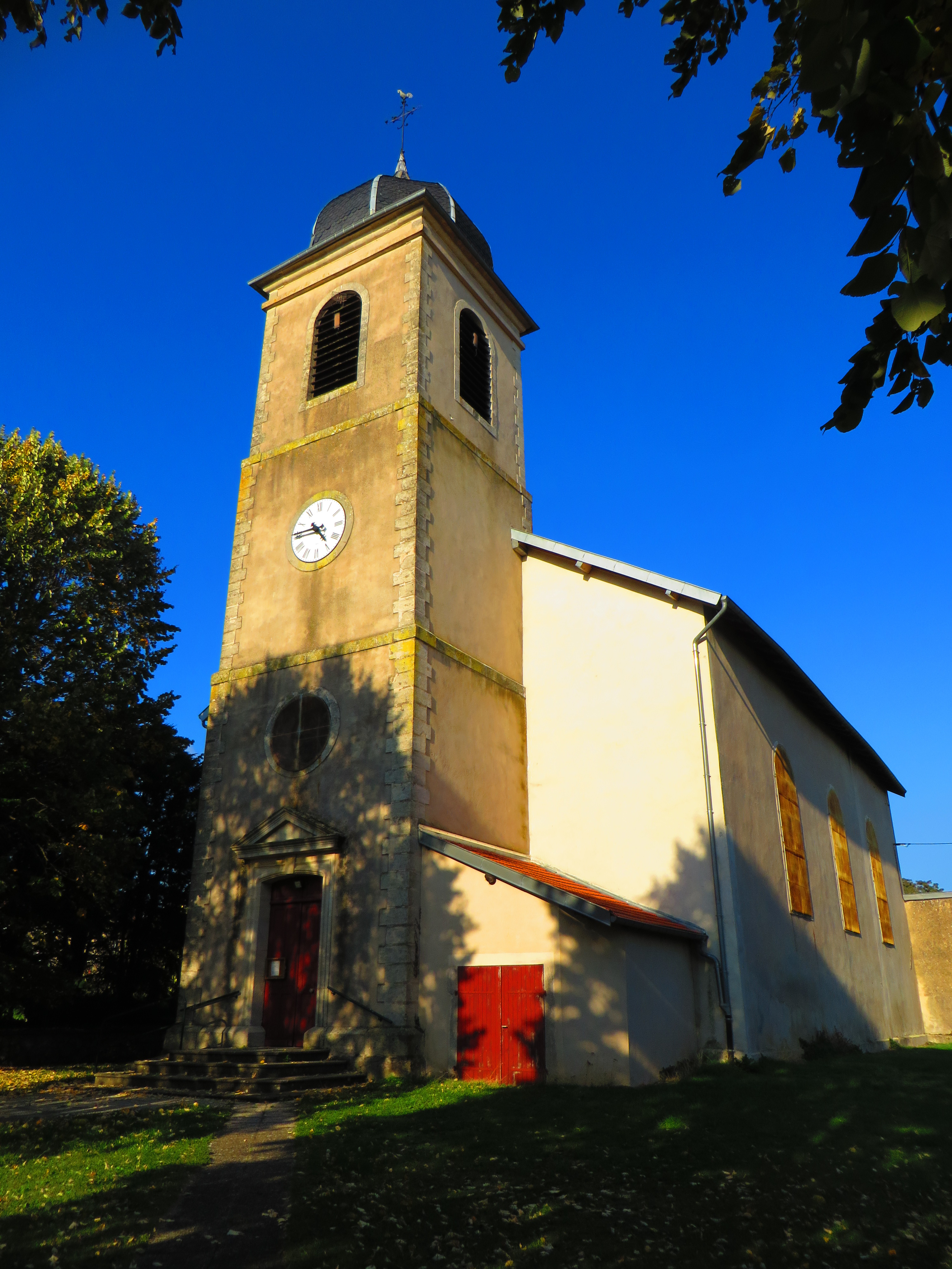 Vaxy l'église Saint-Epvre